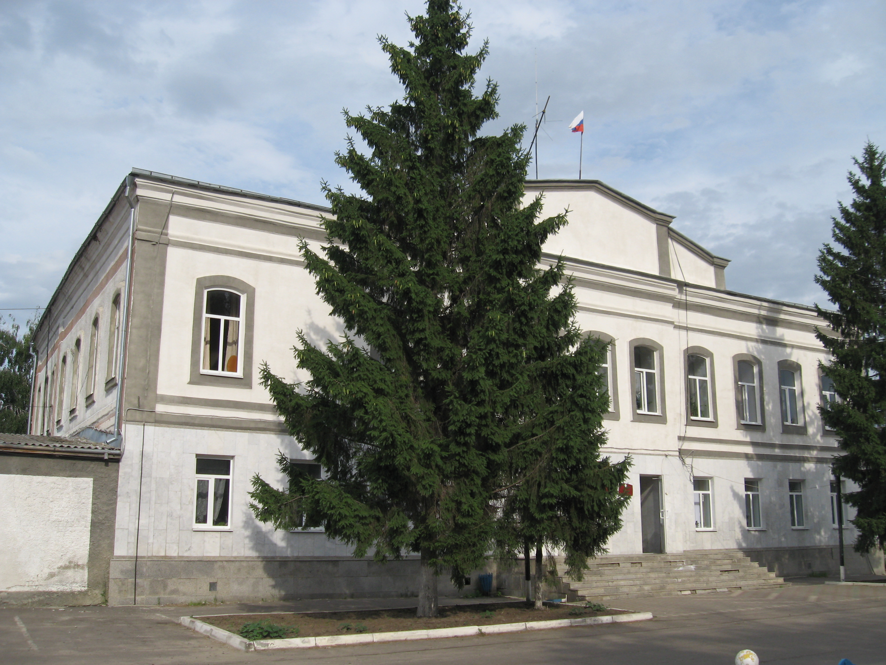 Здание администрации Обоянского района в городе Обоянь